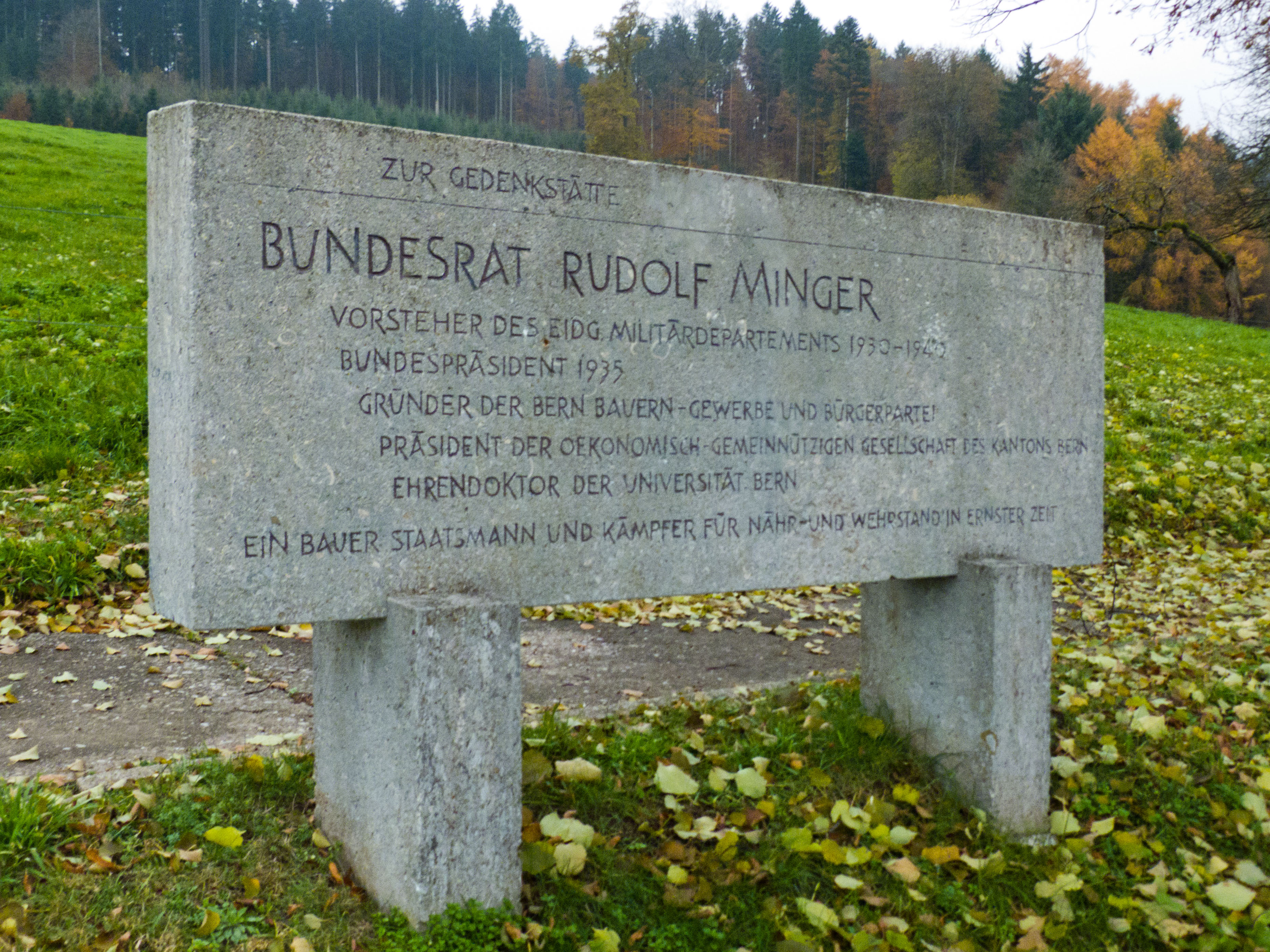 Gedenktafel zum Denkmal für Bundesrat Rudolf Minger. Adresse: Mühlehubelweg, Schüpfen